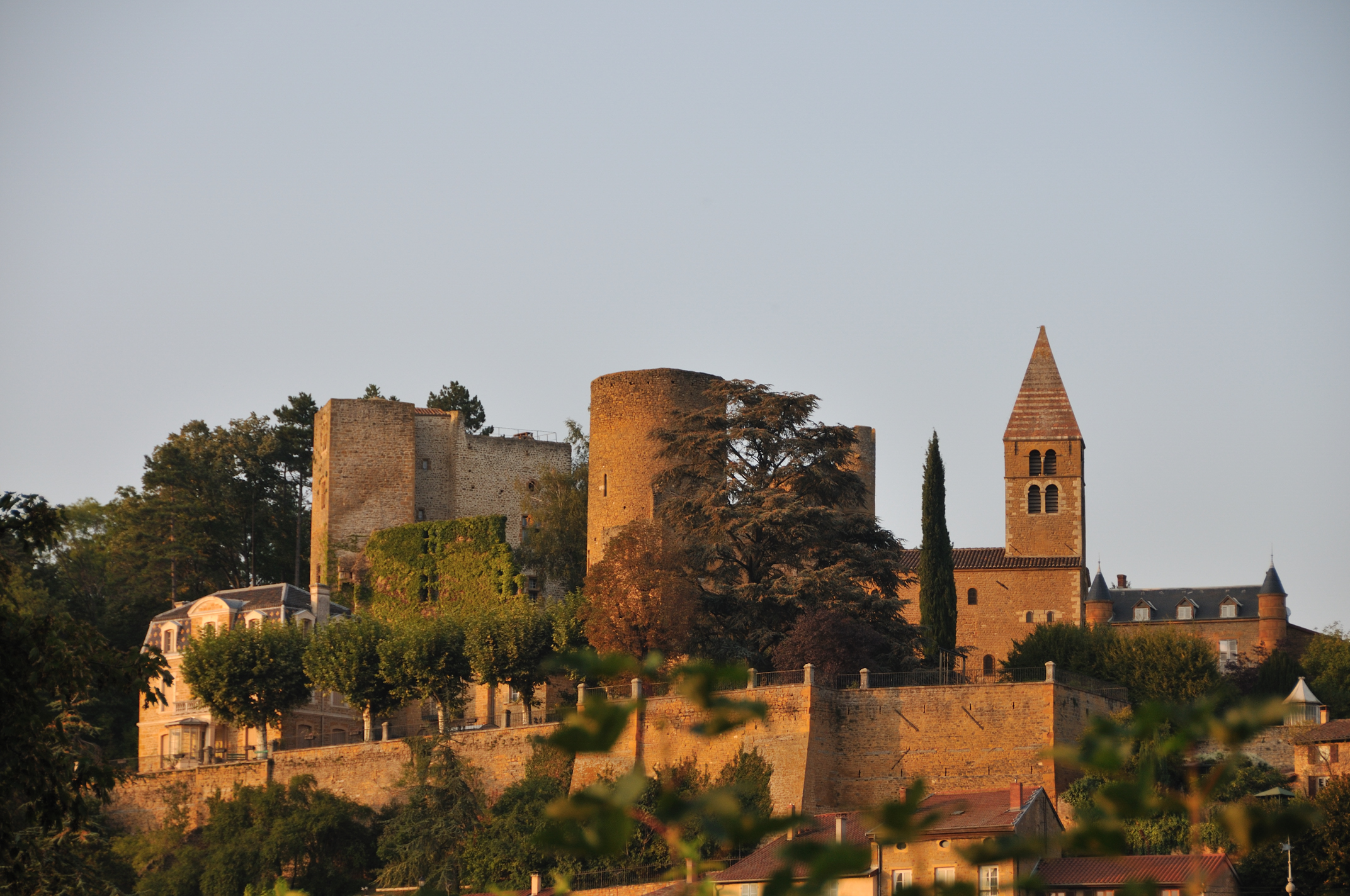 Château de Châtillon-d'Azergues, Châtillon, Rhône, France